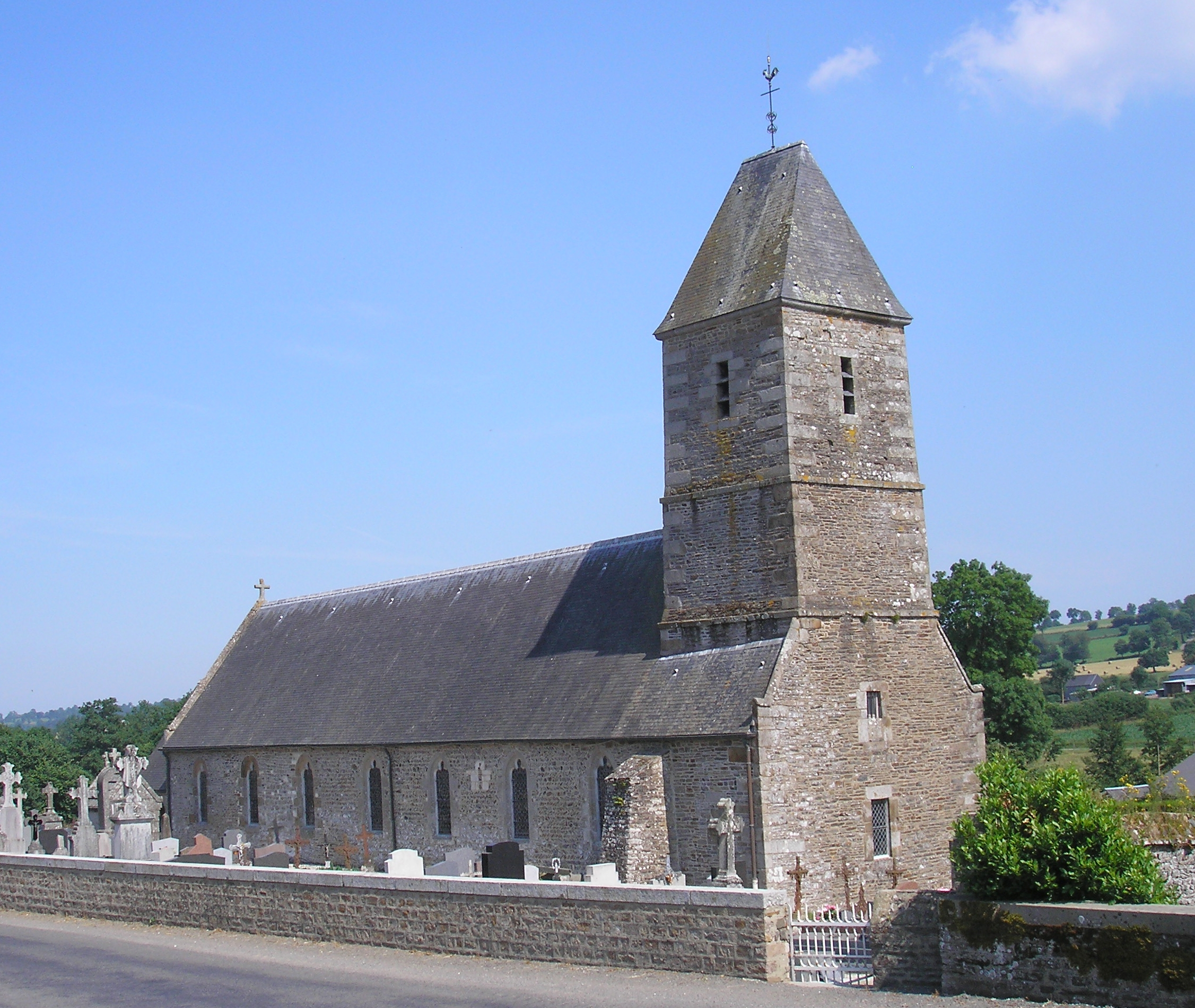 Burcy (Normandie, France). L'église Notre-Dame en granit et schiste.La nef est appareillée en arête-de-poisson.